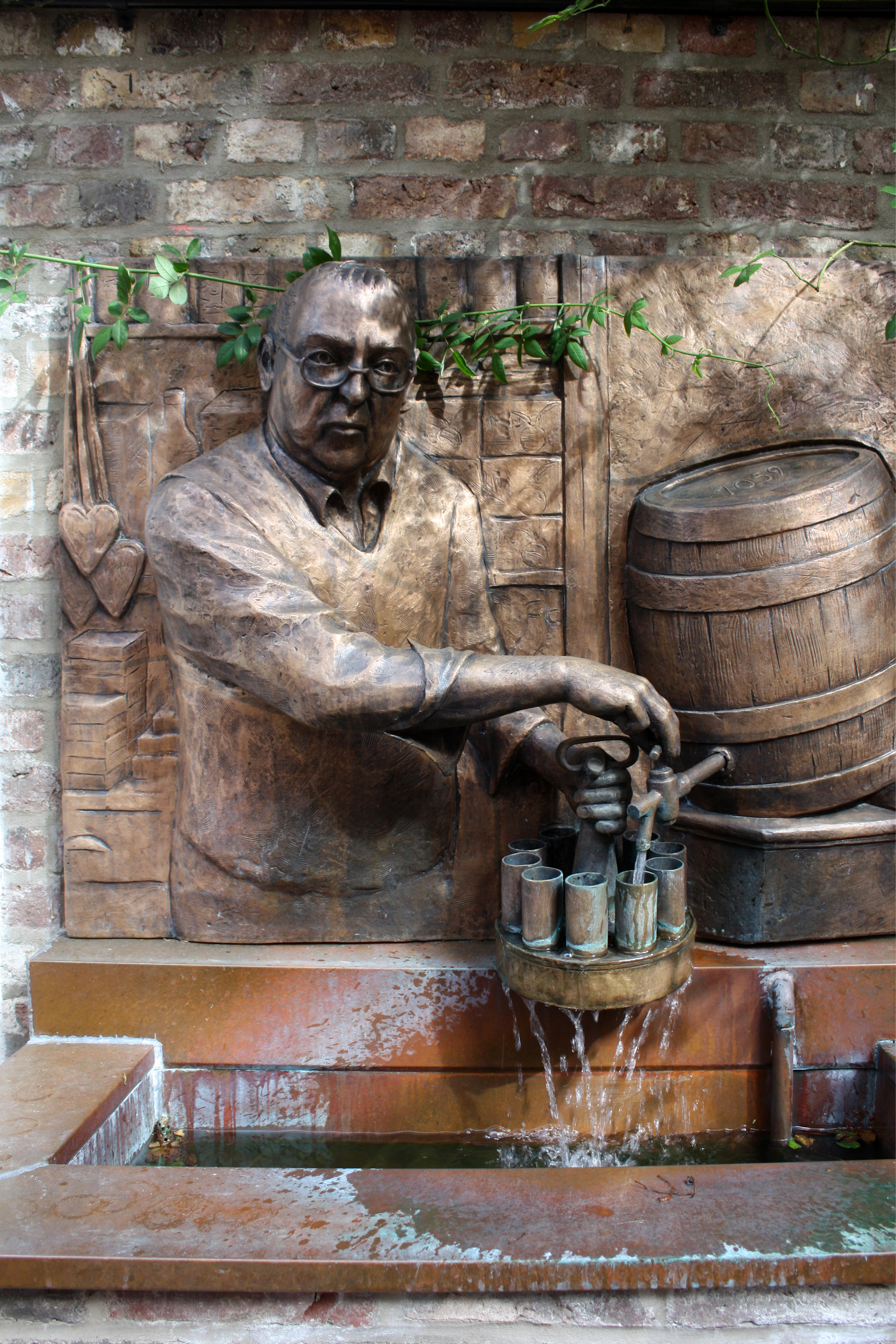 „Lommi“ Brunnen der Gaststätte Lommerzheim in Köln-Deutz